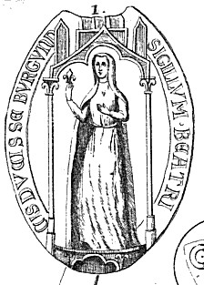 Beatrix Navarrská